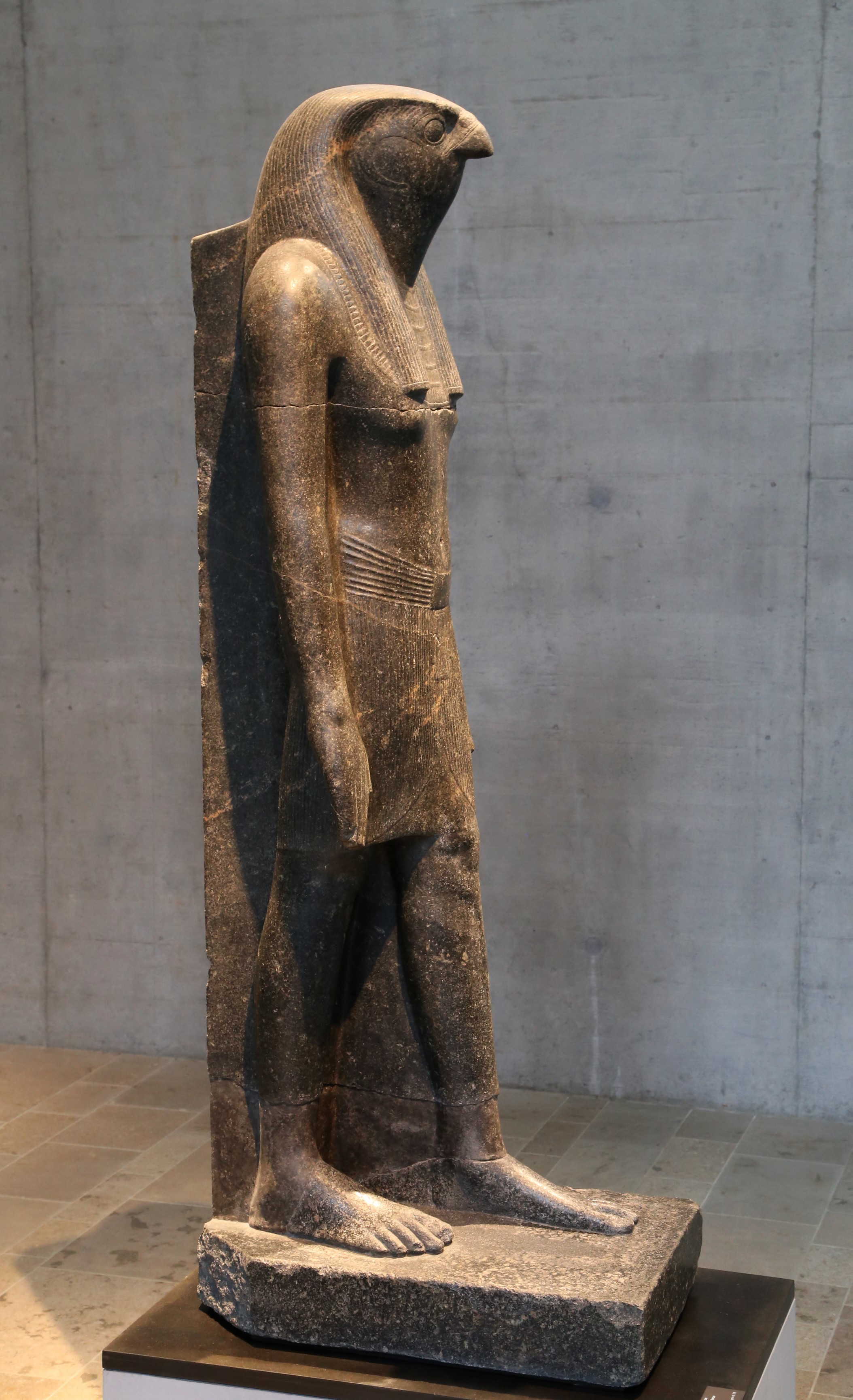 Stand-Schreitfigur des Gottes Horus, Theben-West, Totentempel Amenopys III., um 1360 v. Chr., Granodiorit